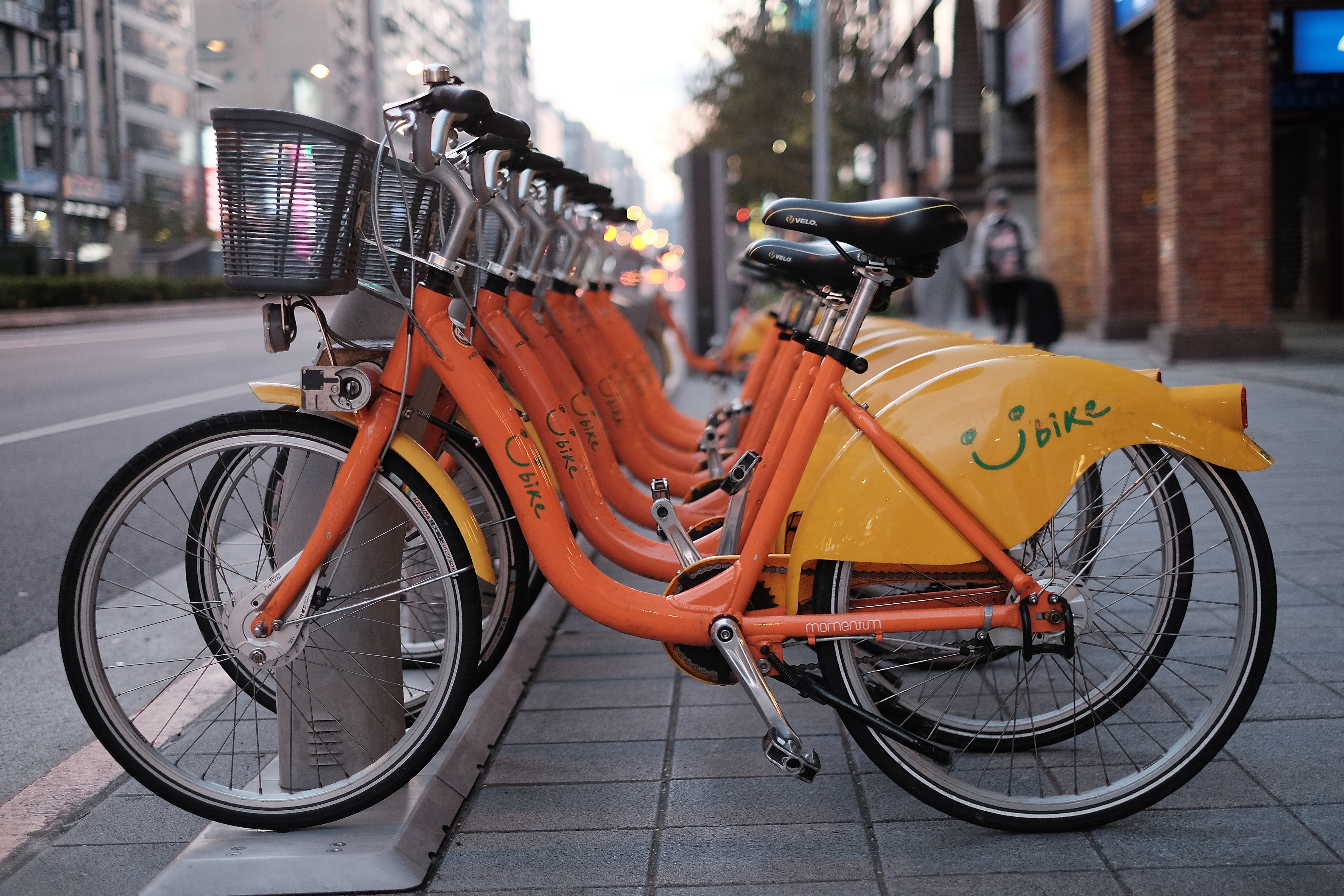 YouBike停放架。